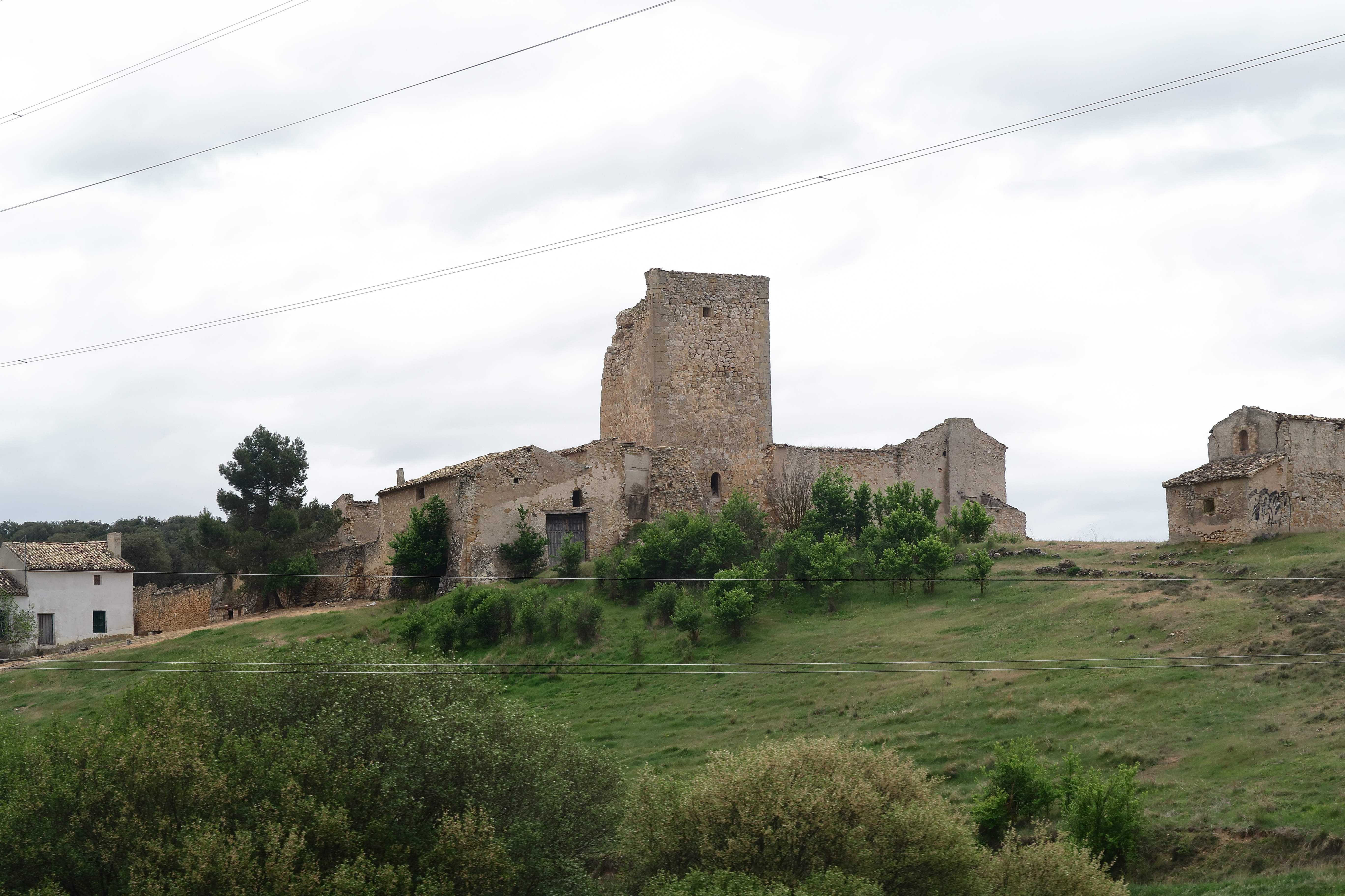 Villares del Sanz, Torre del Monje, desde N-III